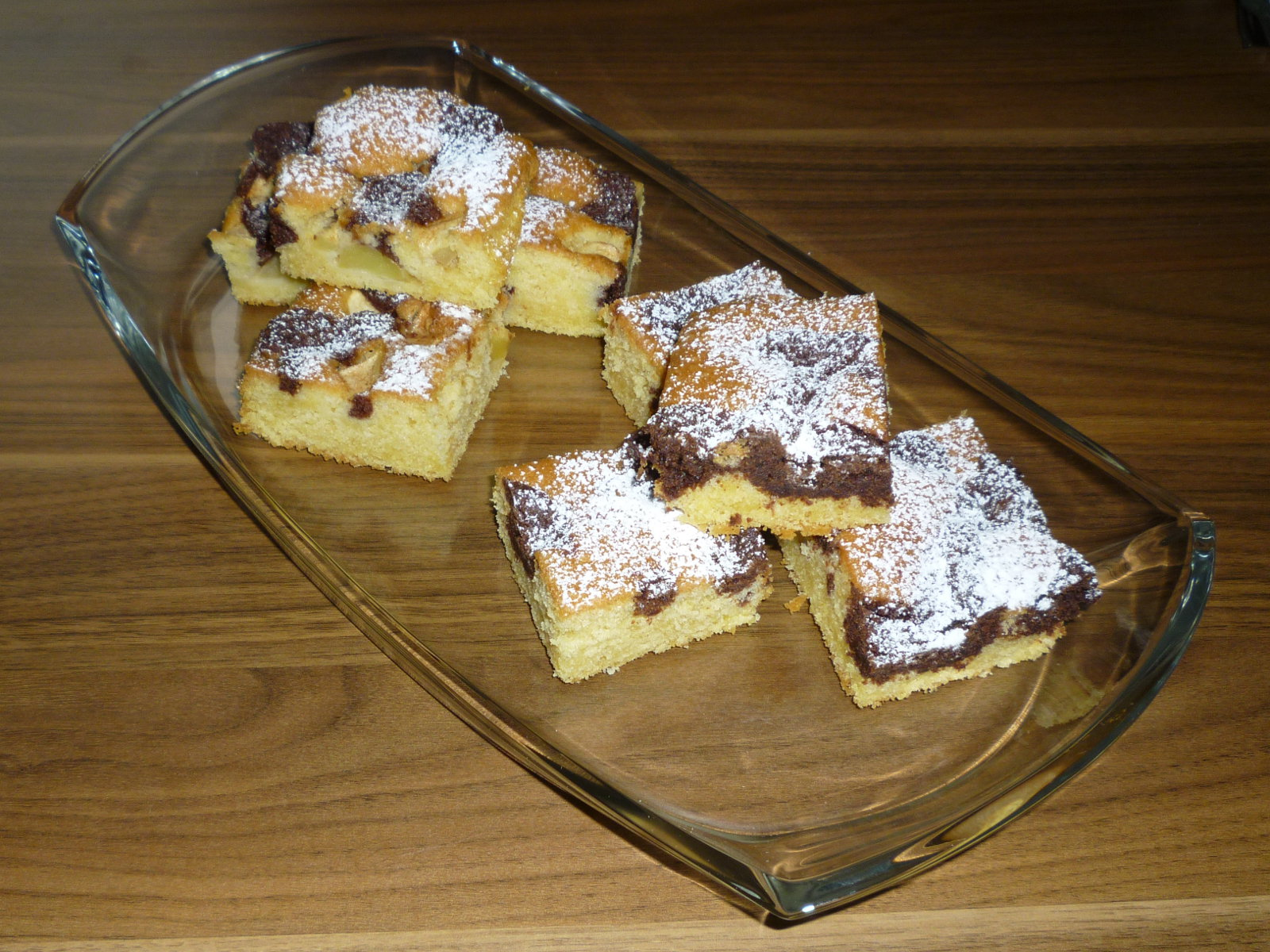 Wolkenkuchenstückchen auf einer Kuchenplatte